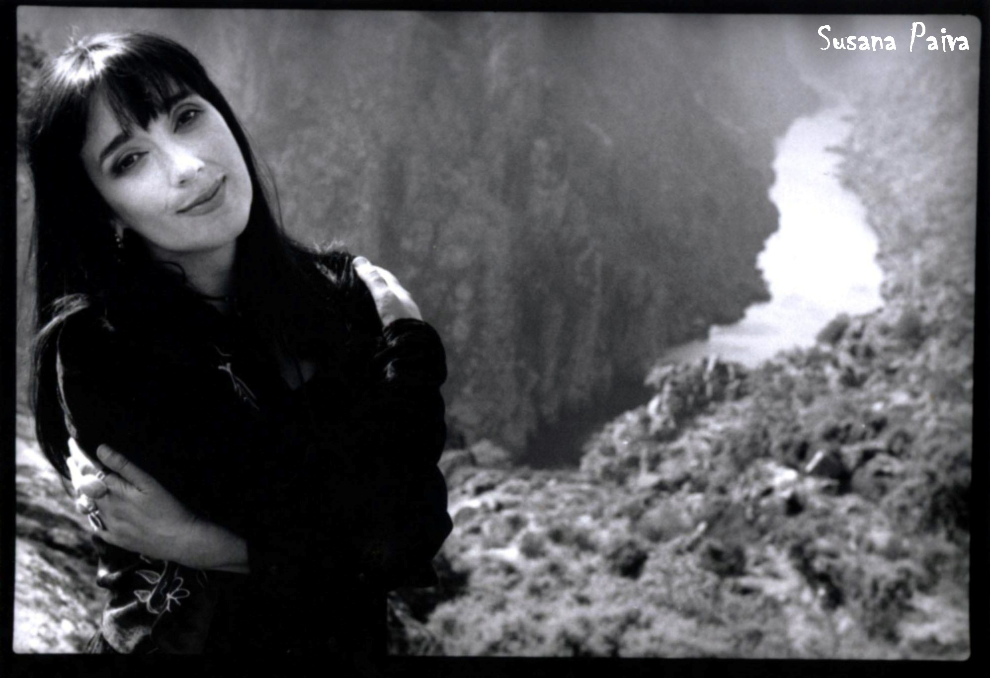 A cantora em Trás os Montes